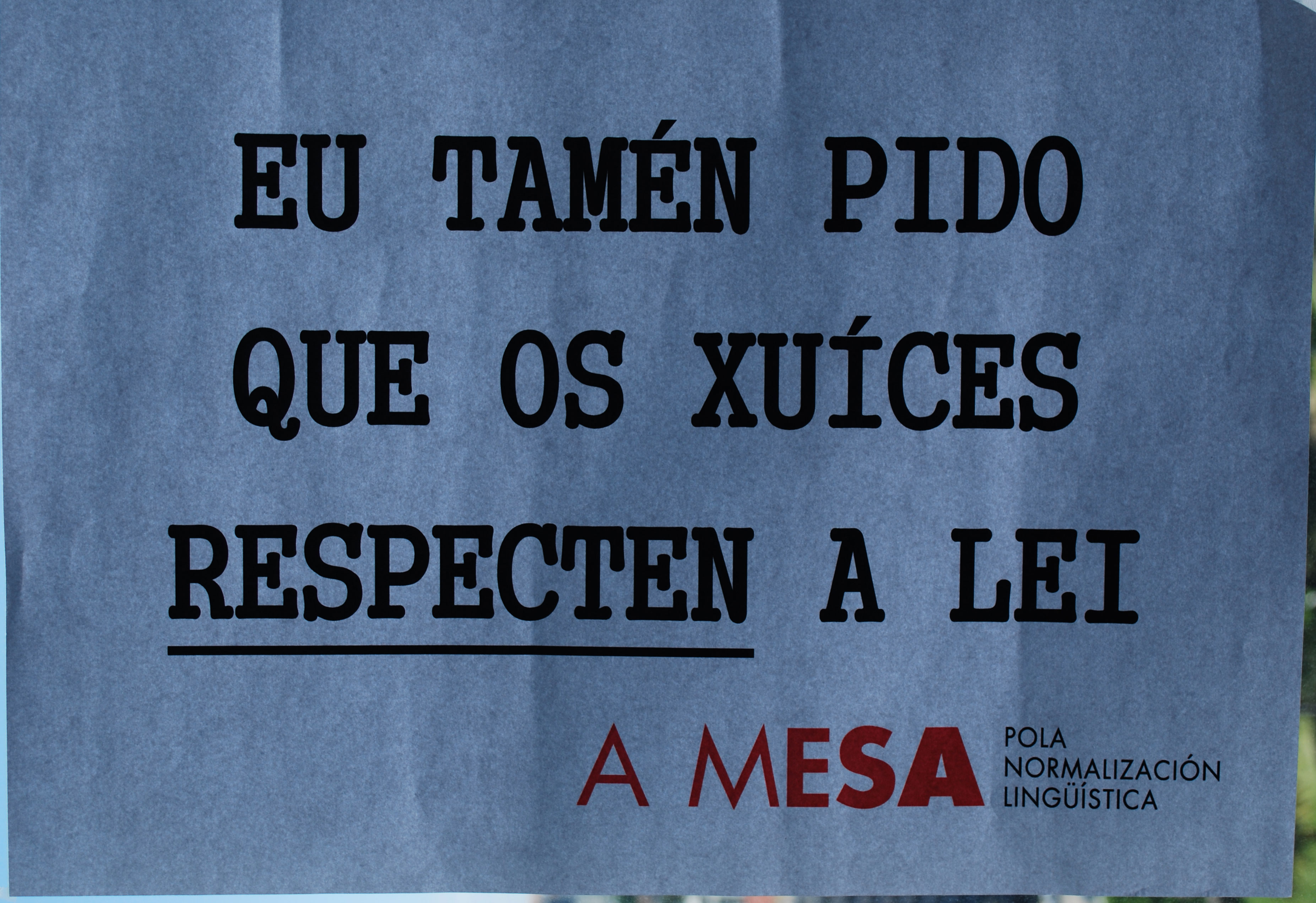 Cartel da mesa pola normalización lingüística MPNL amosado no xuízo a Carlos Callón na Audiencia Provincial da Coruña, Galiza Spain